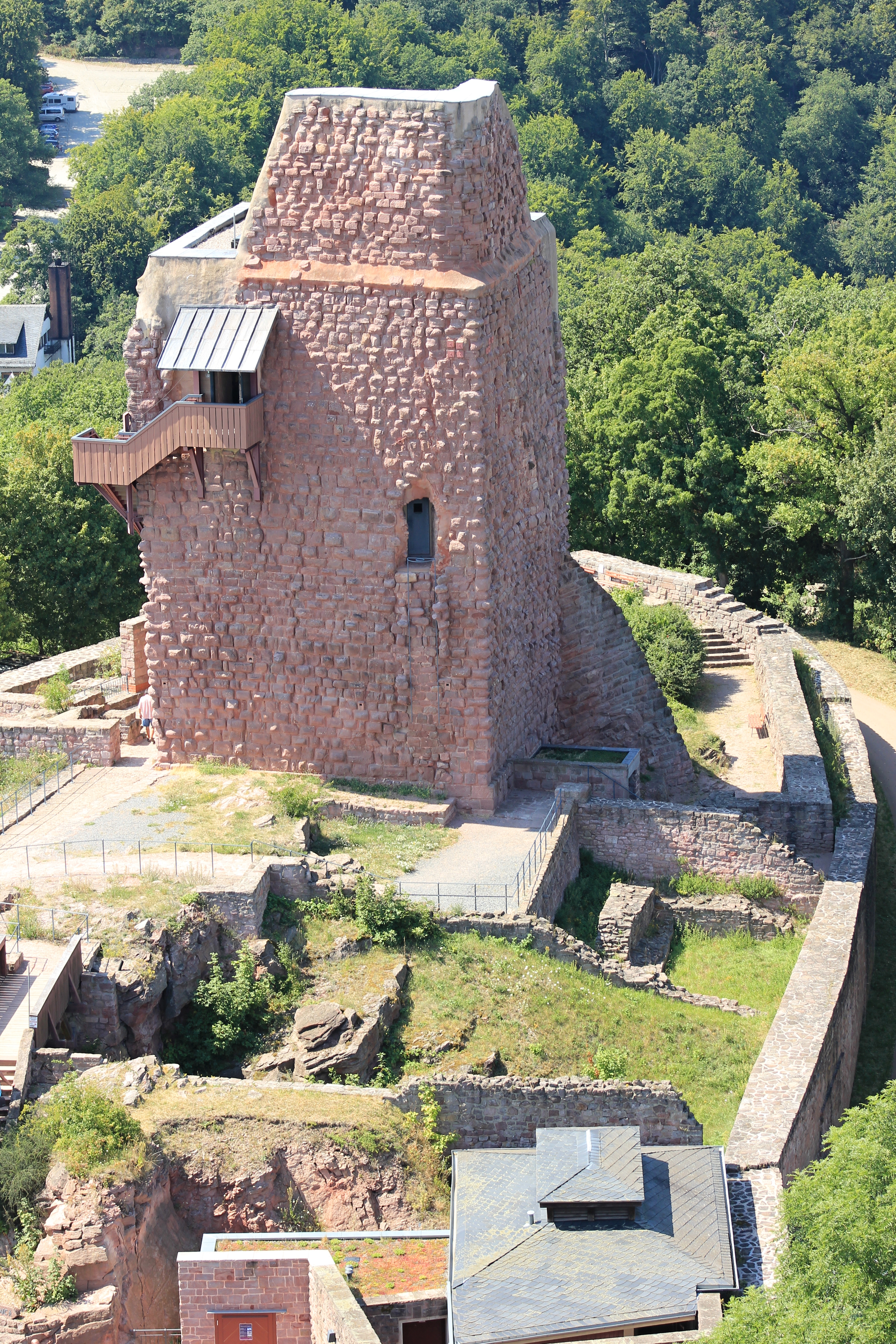 Kyffhäuser - Denkmalsanlage vom Turm aus. Sachsen.